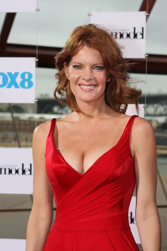 Michelle Stafford